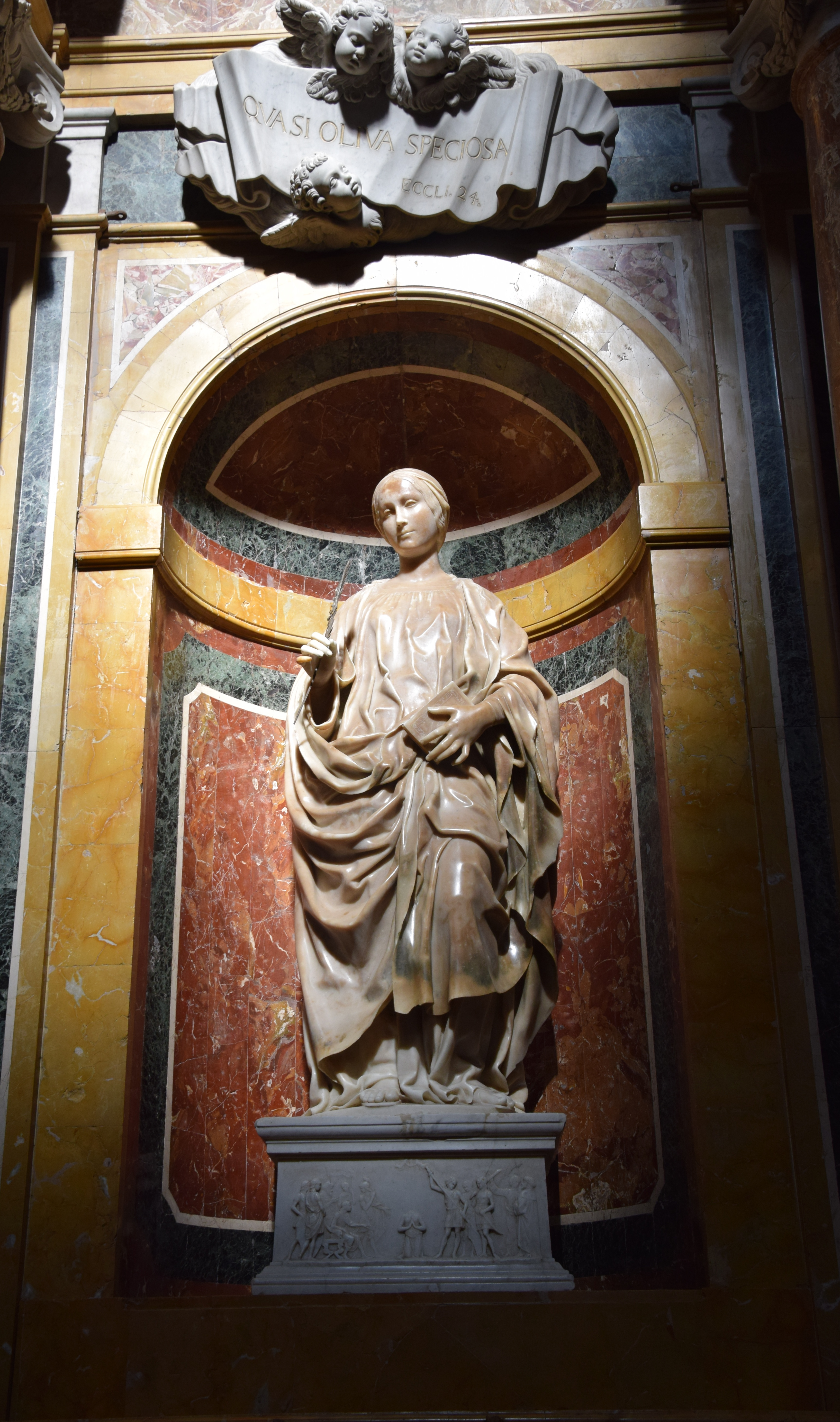 Sant'Oliva (A.Gagini,1511)